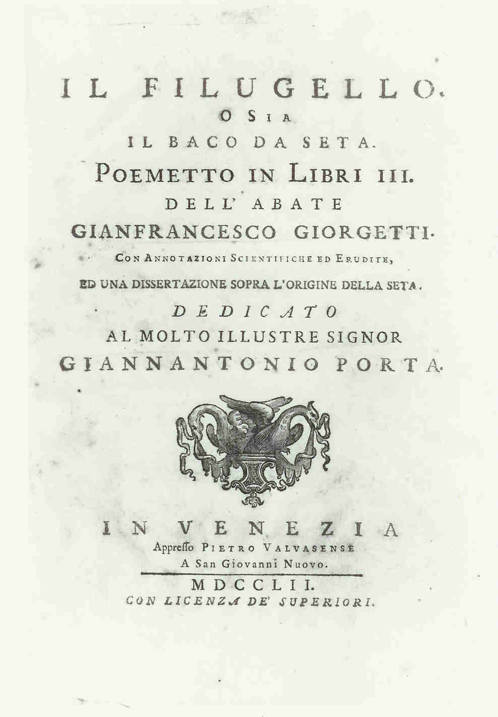 Illustrazione da testo del secolo XVIII